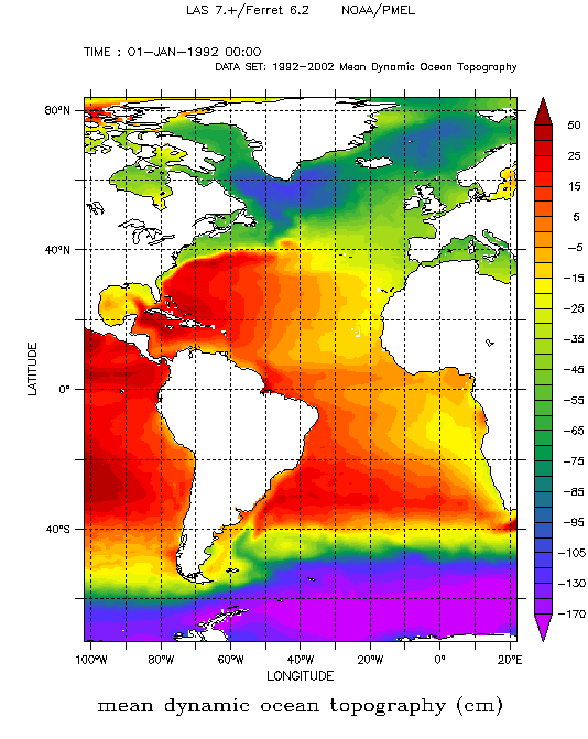 Horizontale Verteilung der dynamischen Topographie der Meeresoberfläche im Atlantik.